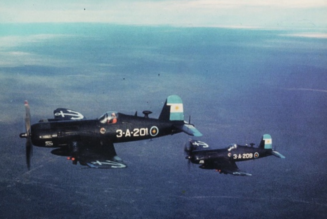 Los aviones F4U-5 Corsair 3-A-201 y 3-A-209, vuelan hacia Magdalena para atacar el Regimiento 8 de Tanques, durante el enfrentamiento entre "Azules y Colorados" de abril de 1963.